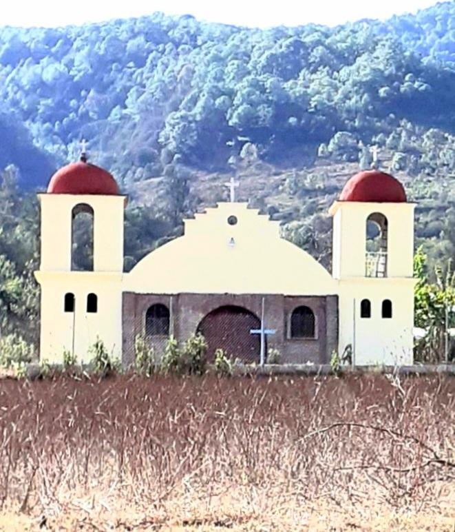 Capilla del Barrio de Dolores, San Juan Achiutla, Estado de Oaxaca, México.